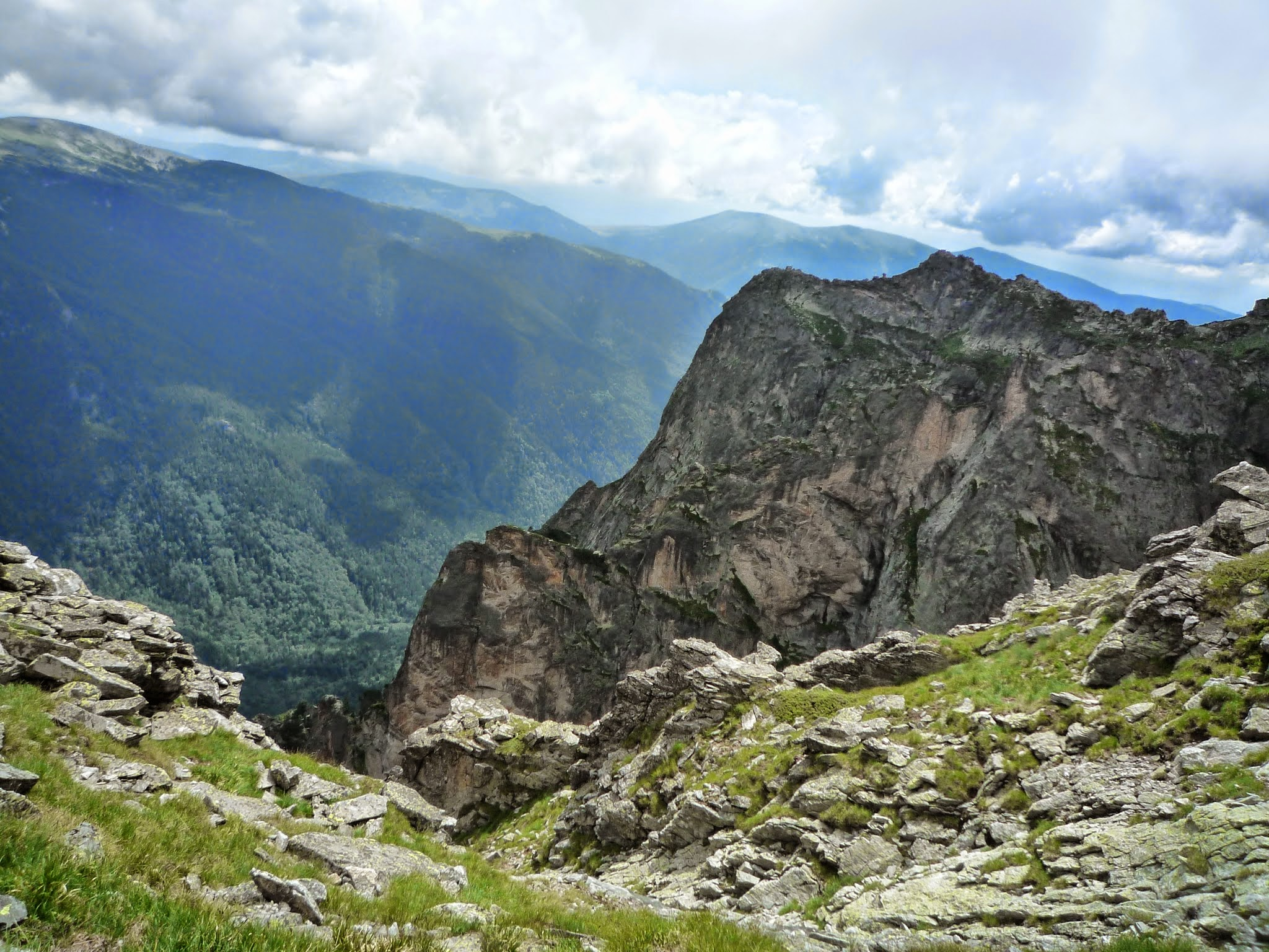 Двуглав;Рила